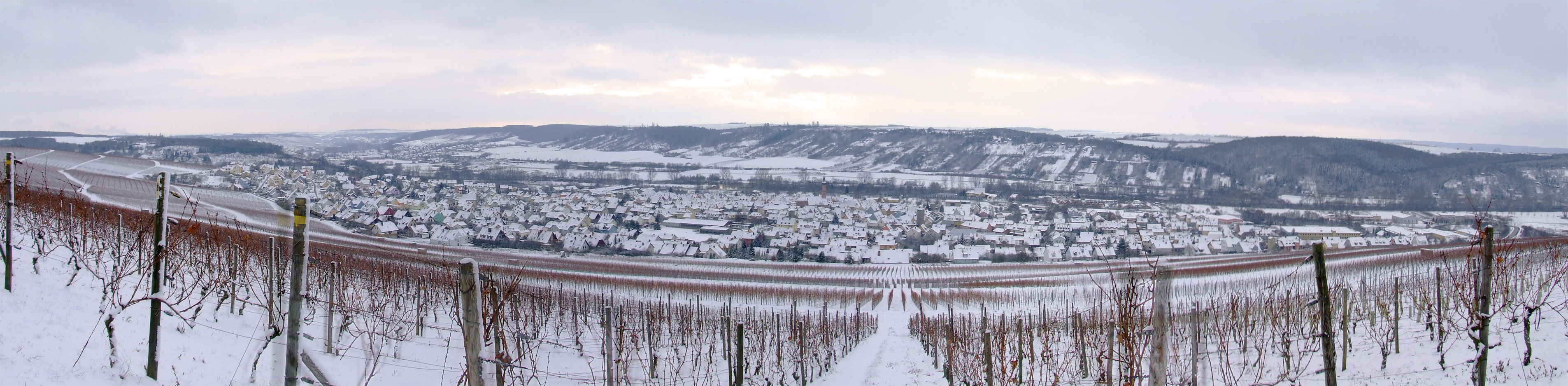 Eibelstadt von den Weinbergen aus fotografiert (Schneefall in der vorherigen Nacht) Uhrzeit: 11:56